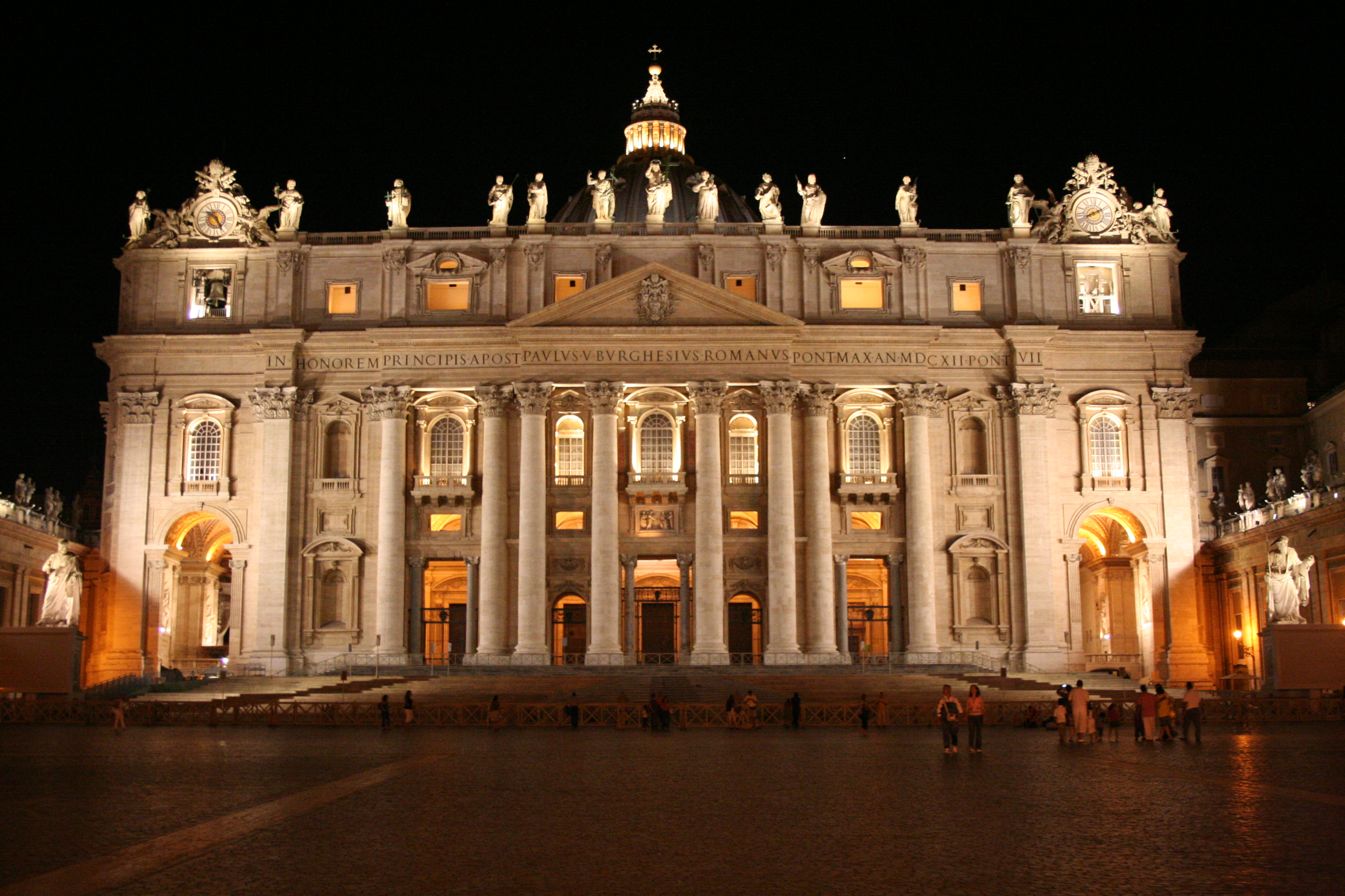 Vista nocturna de la Basílica de Sant Pere del Vaticà.